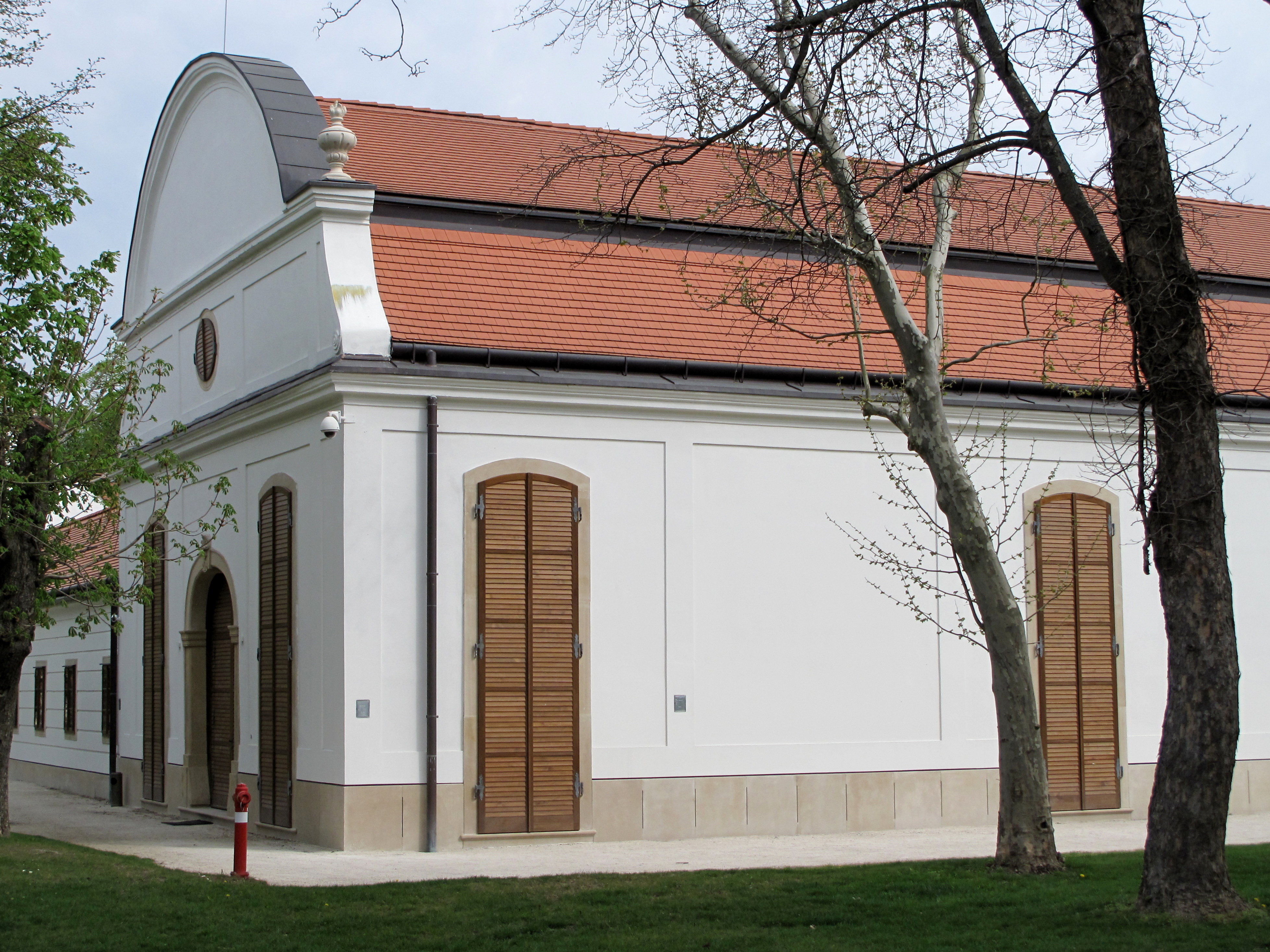 Schloss Esterház/Fertöd (Ungarn), Marionettenspielhaus, West-und Südfassade (tw.); Bauzustand Frühjahr 2015, nach der Wiederherstellung der Außenfassade; Foto Klaus M. Pollheimer.